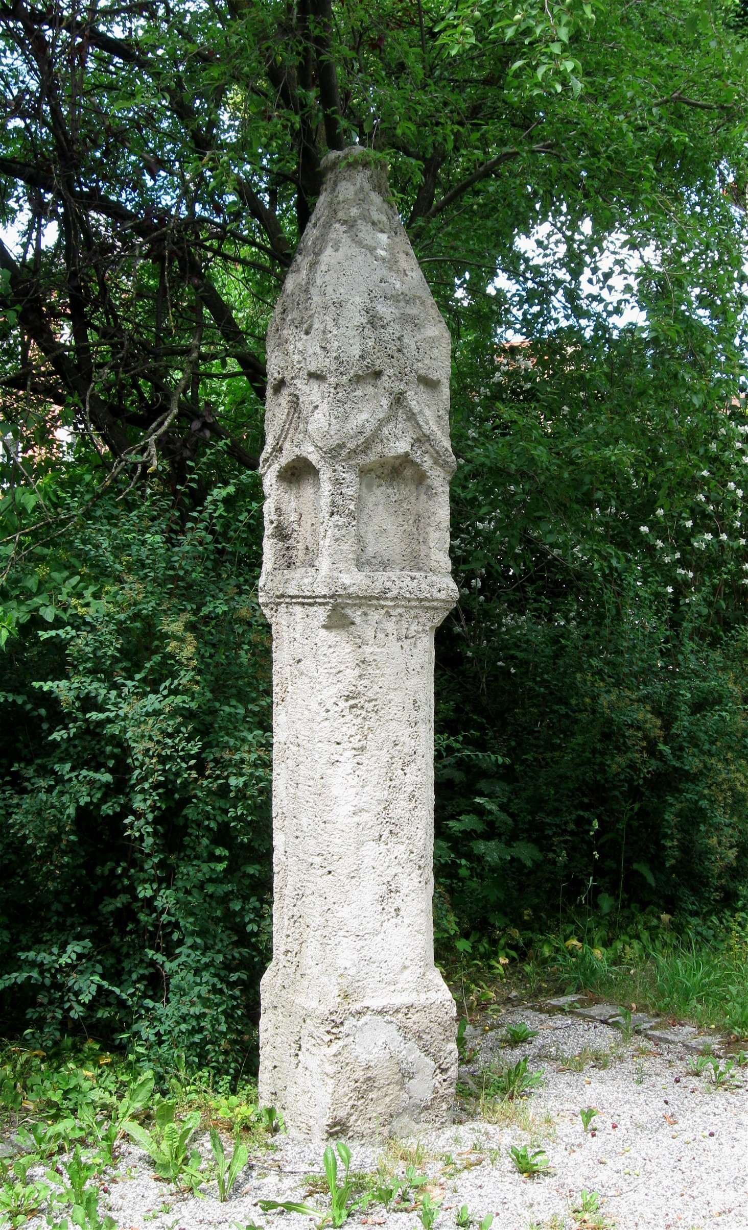 Ebersberger Straße; Burgfriedensäule von 1514, am jetzigen Standort seit 1856